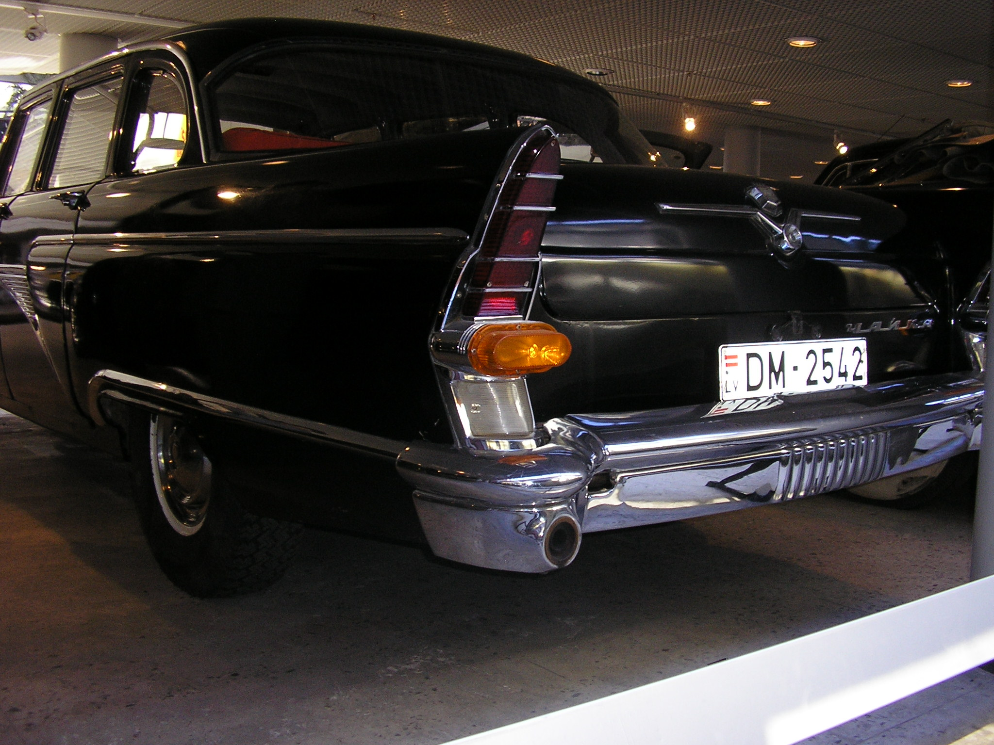 A 1974 GAZ-13 "Chaika"